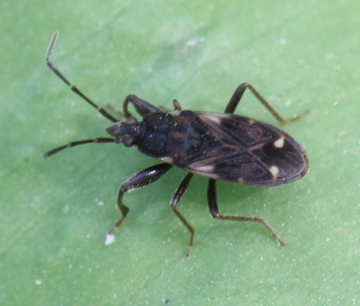 Wanze Eremocoris podagricus am 8. April 2020 auf einem Bärlauch-Blatt in einem Wald nahe Walldorf/Baden